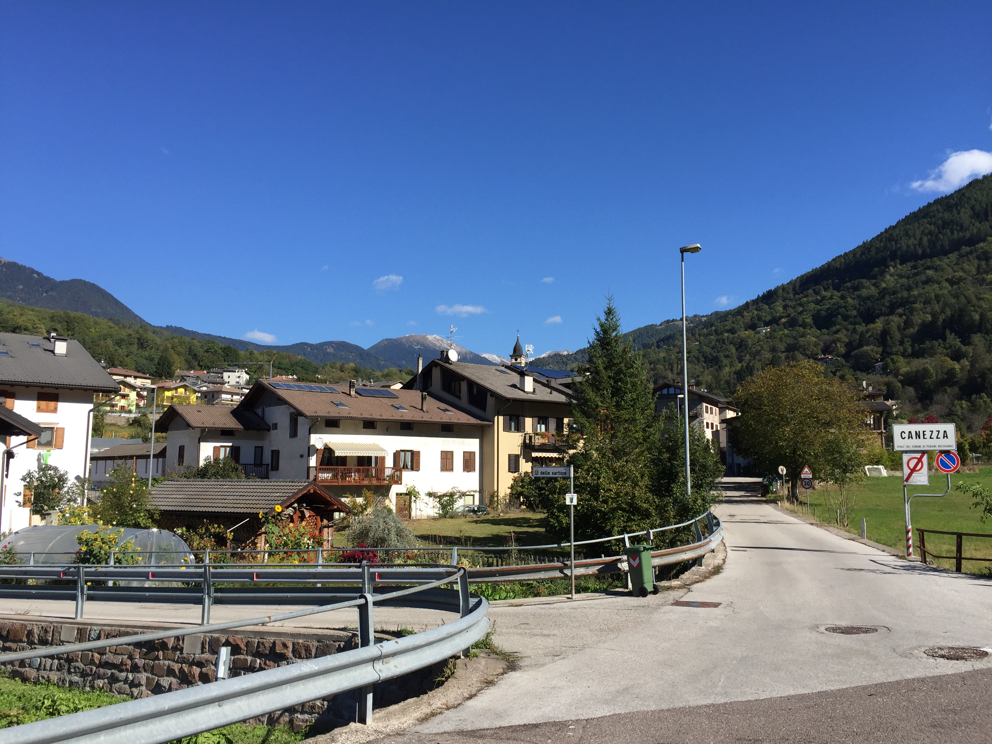 Veduta dell'abitato di Canezza